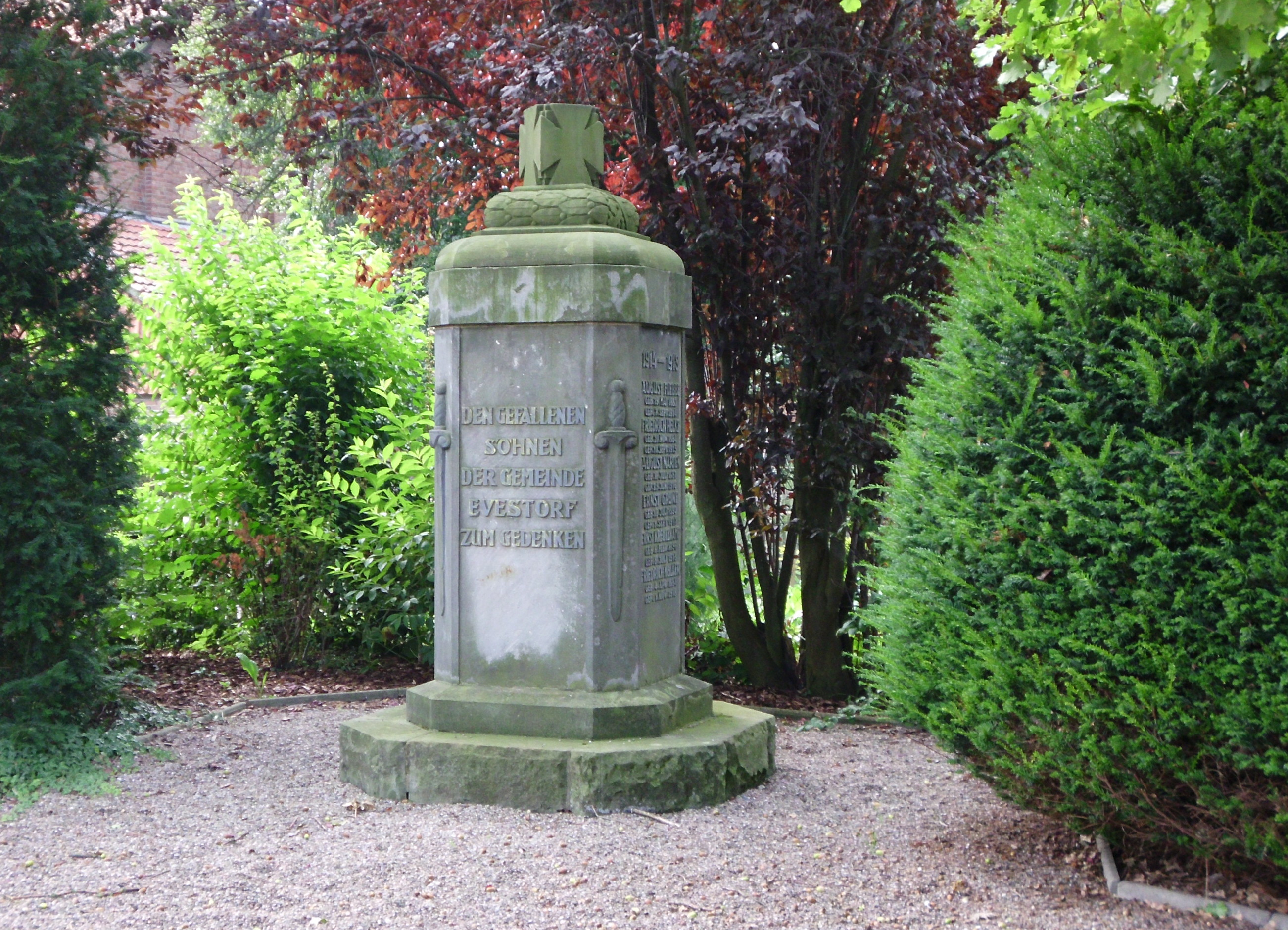 Kriegerdenkmal in Evestorf zu Ehren der Gefallenen im 1. und 2. Weltkrieg in 30974 Wennigsen, Zum Rießenfelde Niedersachsen - Deutschland